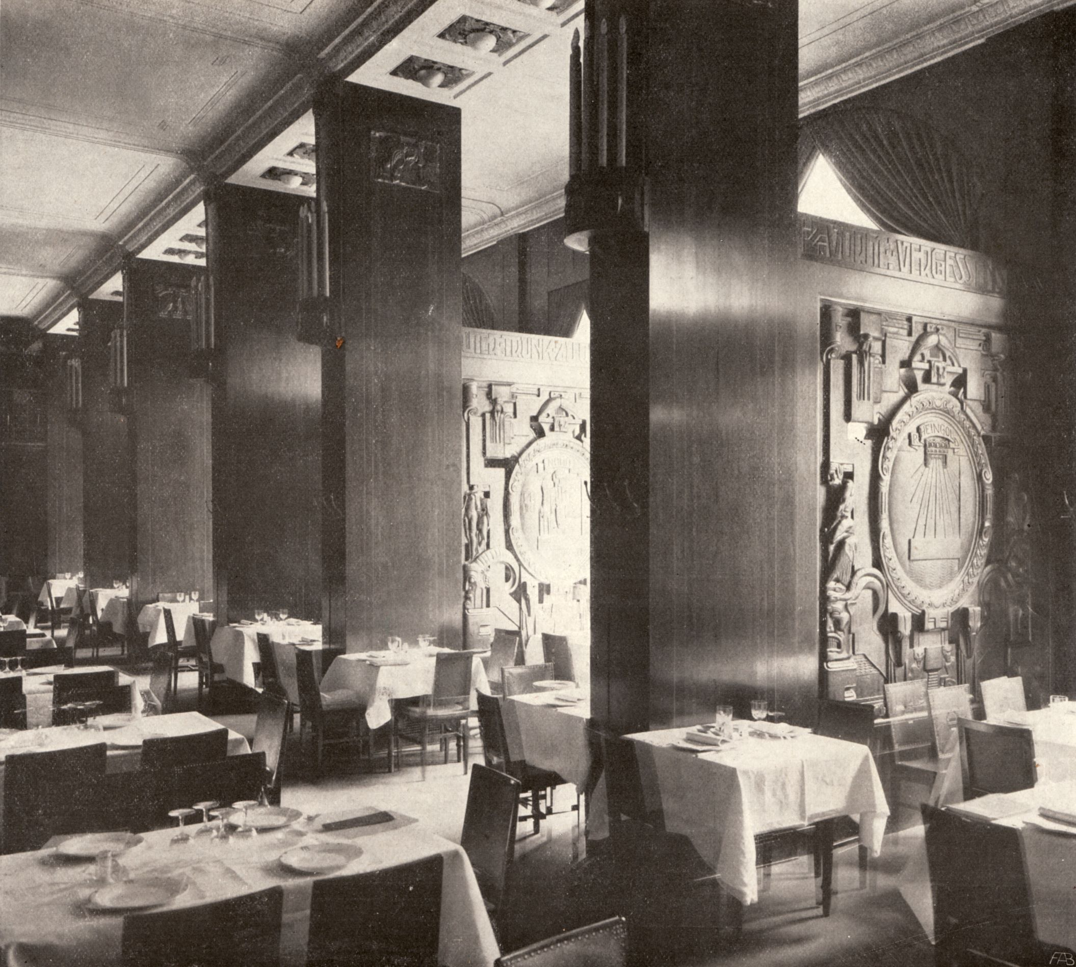 Berlin - Weinhaus Rheingold, Ansicht des Pfeilersaals